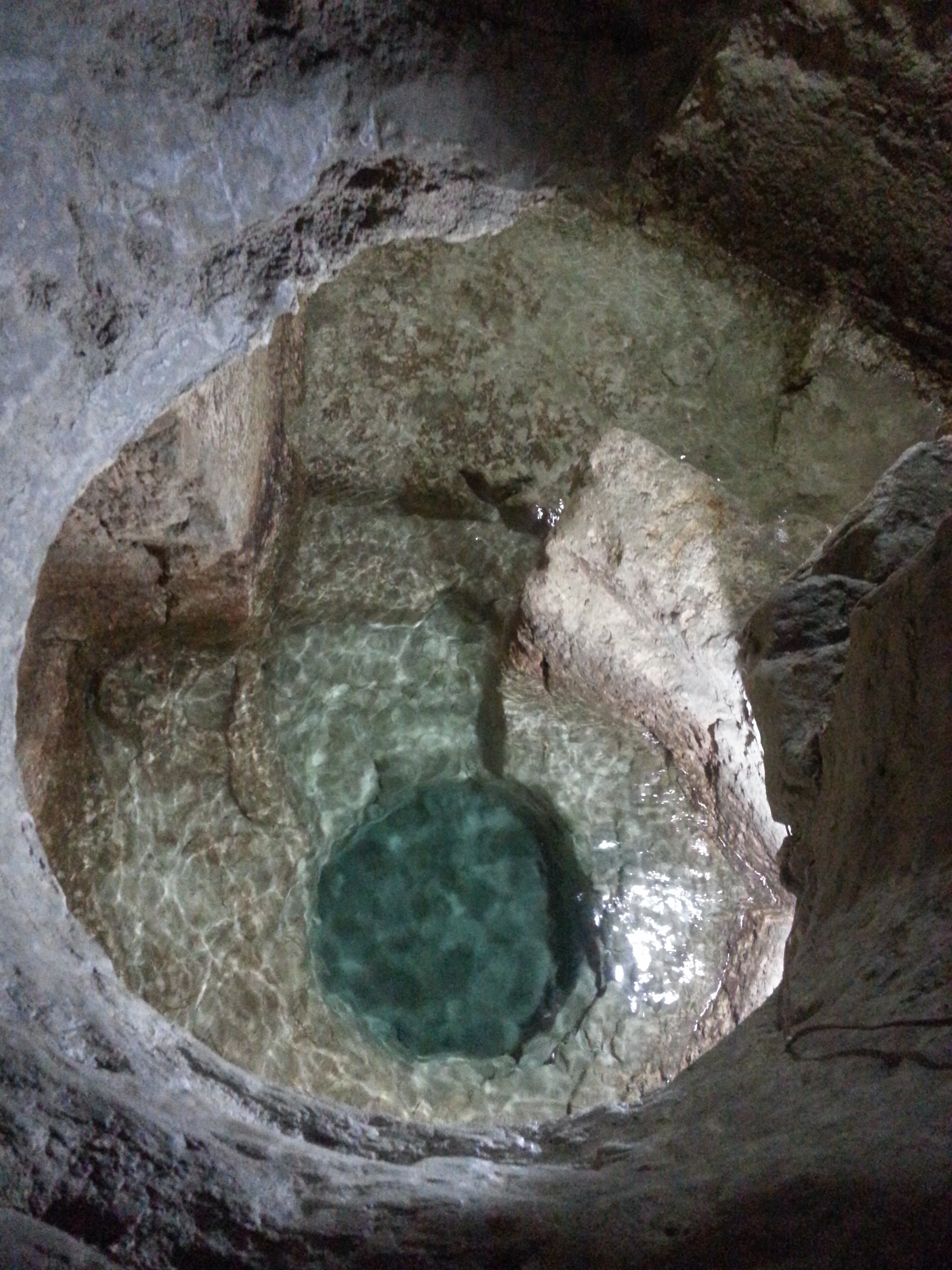 Il mikveh che si trova a diciotto metri di profondità sotto la chiesa di san Filippo Apostolo